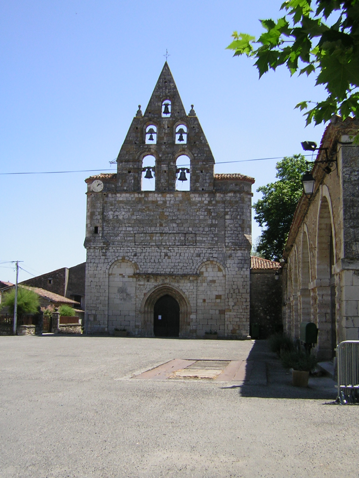 Alan: iglesia con espadaña en tres alturas, del siglo XIV.